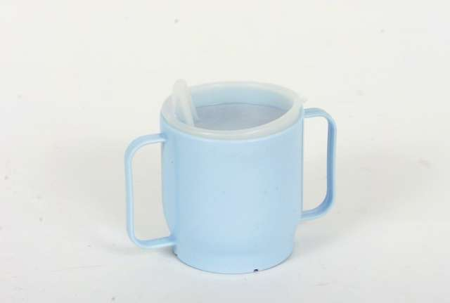 Tutekopp i plast. H. 9,3 cm. Norsk Folkemuseum, NF. 2001-0509.